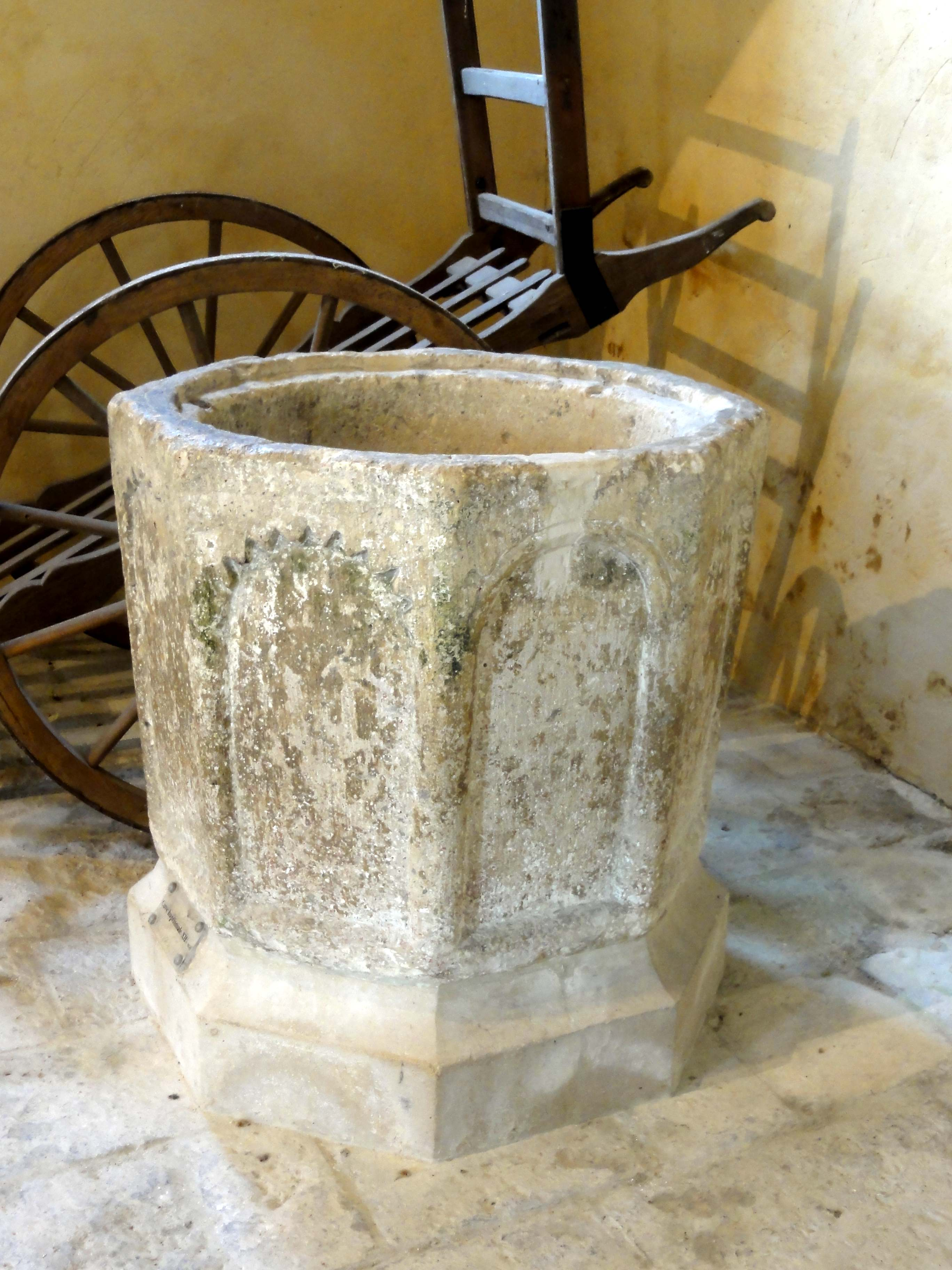 Fonts baptismaux.